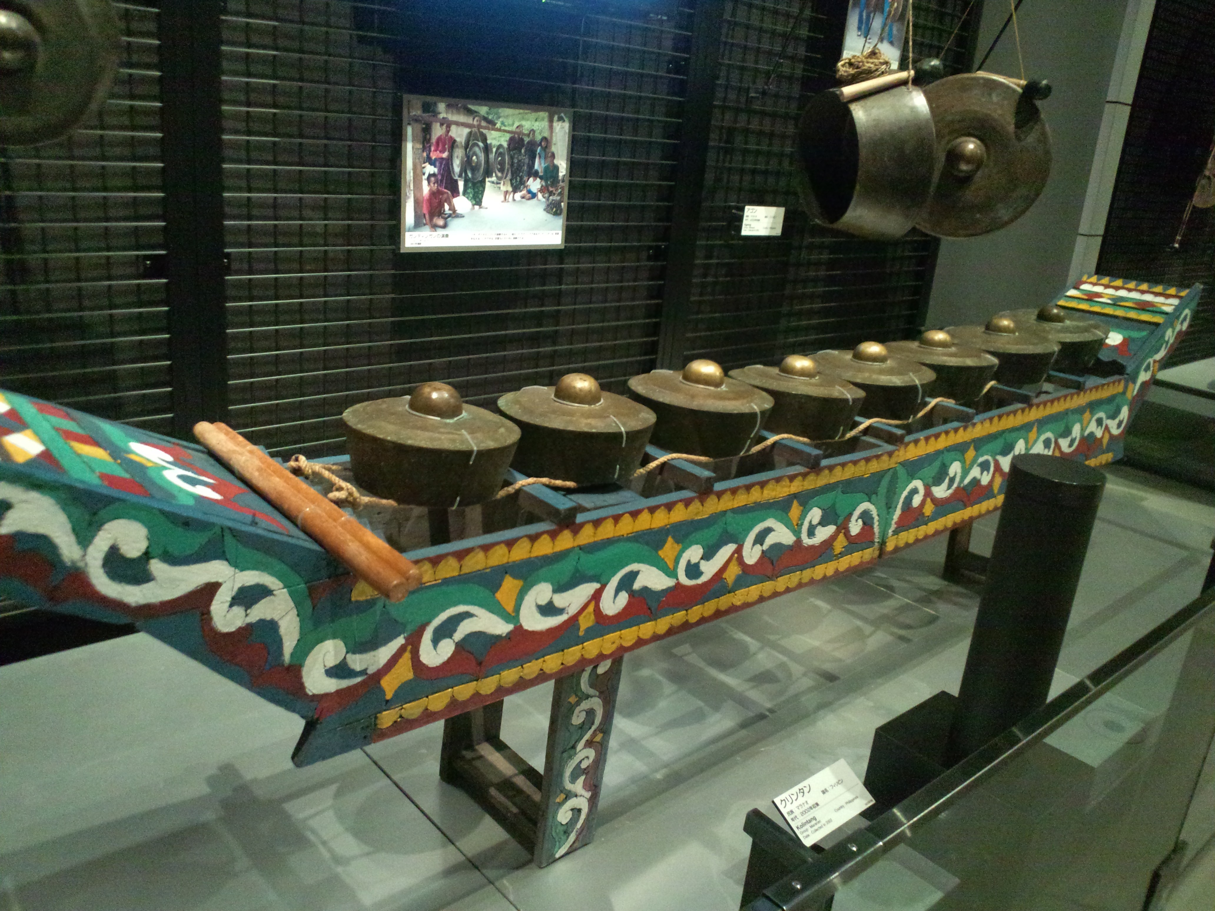 国立民族学博物館（大阪） クリンタン（フィリピン、マラナオ族、2002年収集）